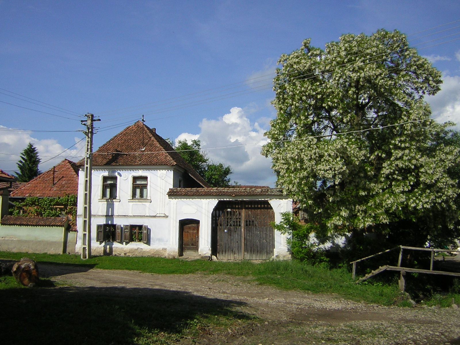 Homoródújfalu, parasztház